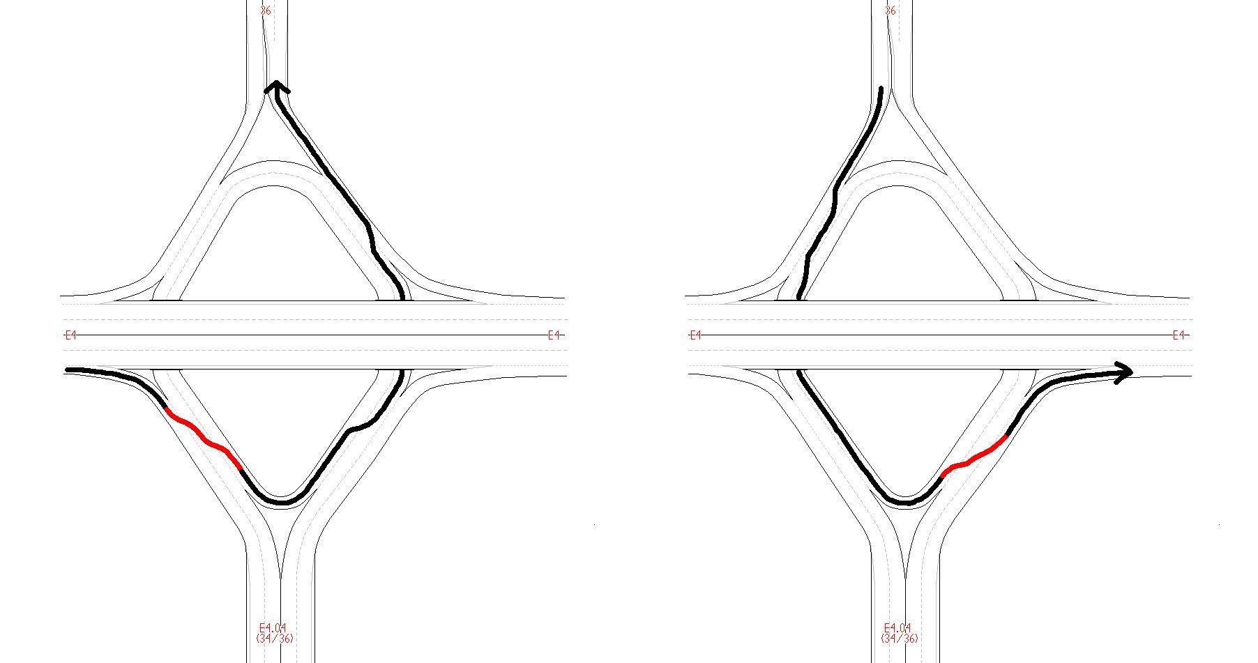 Trafikplats Linköping västra (Tift). Dubbla körfältsbyten är rödmarkerade. Originalet skapat av Lavas i Paint.